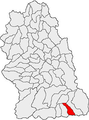 Categorie:Hărţi ale judeţului Hunedoara